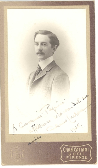 Immagine tratta dall'archivio G. Papini conservato presso la Fondazione Primo Conti di Fiesole. Foto di J. Luchaire con dedica: A Giovanni Papini, affettuoso ricordo del suo amico Giuliano Luchaire - 1906 Timbro del fotografo Cav. A. Cattani & Figli - Firenze